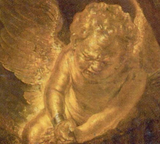 detail 3